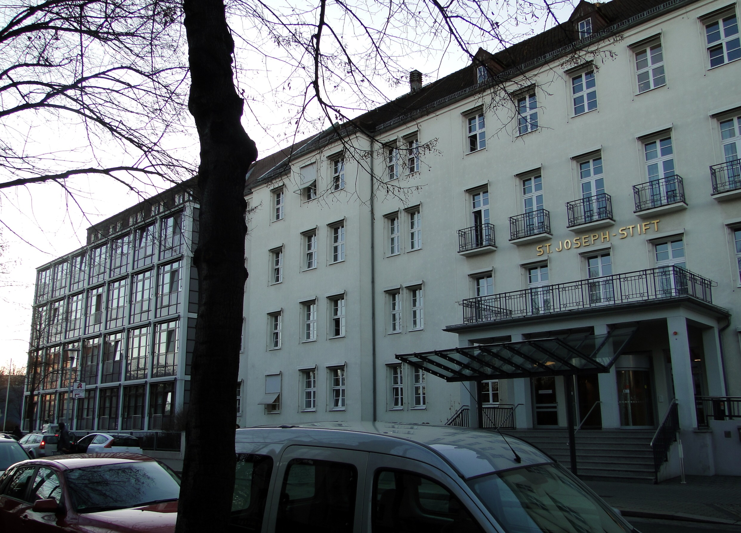 Das Dresdner St. Joseph-Stift in der Johannstadt